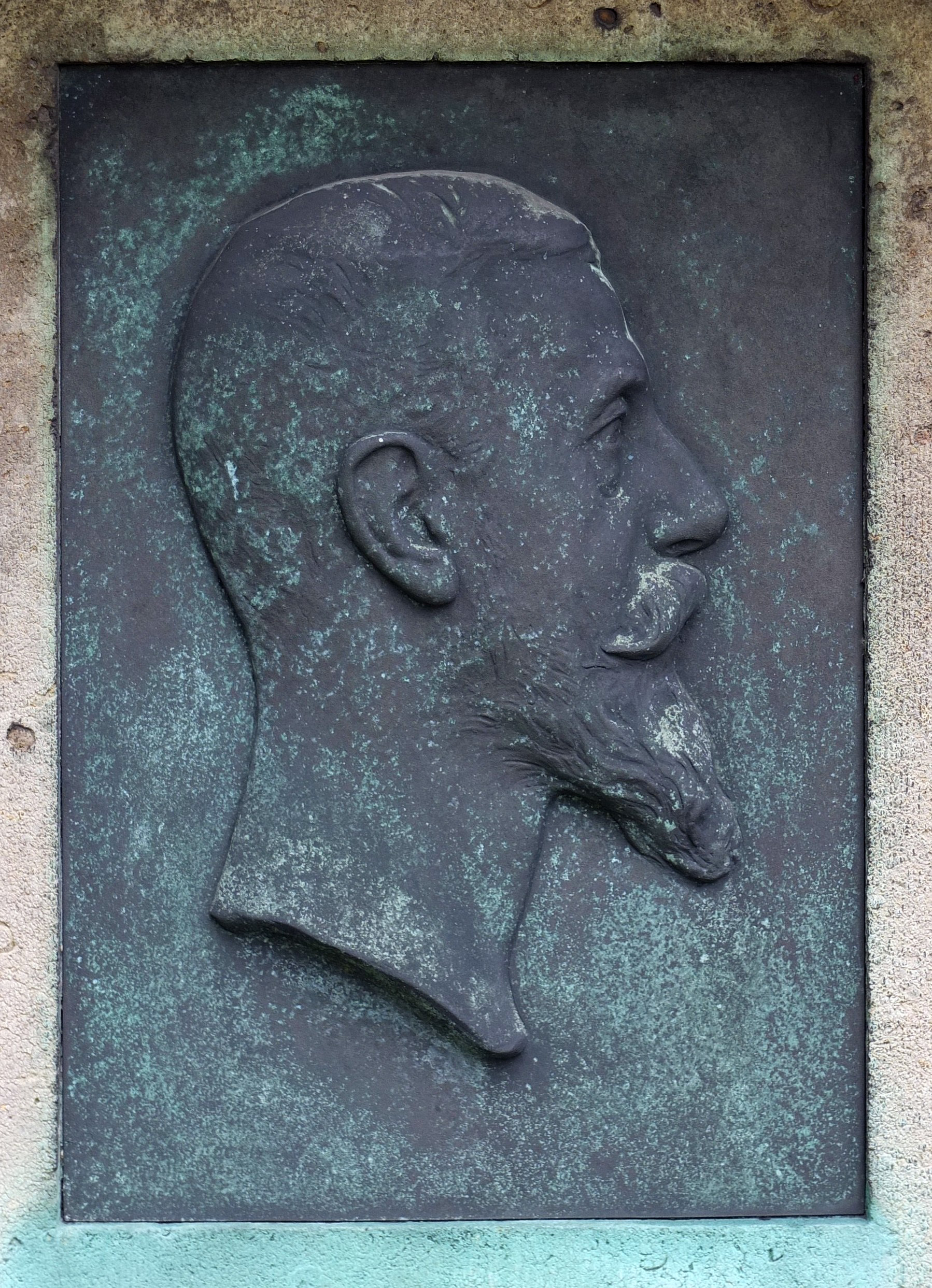 Relief Franz Skarbina, angefertigt von Martin Schauß, am Grabstein von Skarbina auf dem Alten St. Jacobi-Friedhof in Berlin-Neukölln.